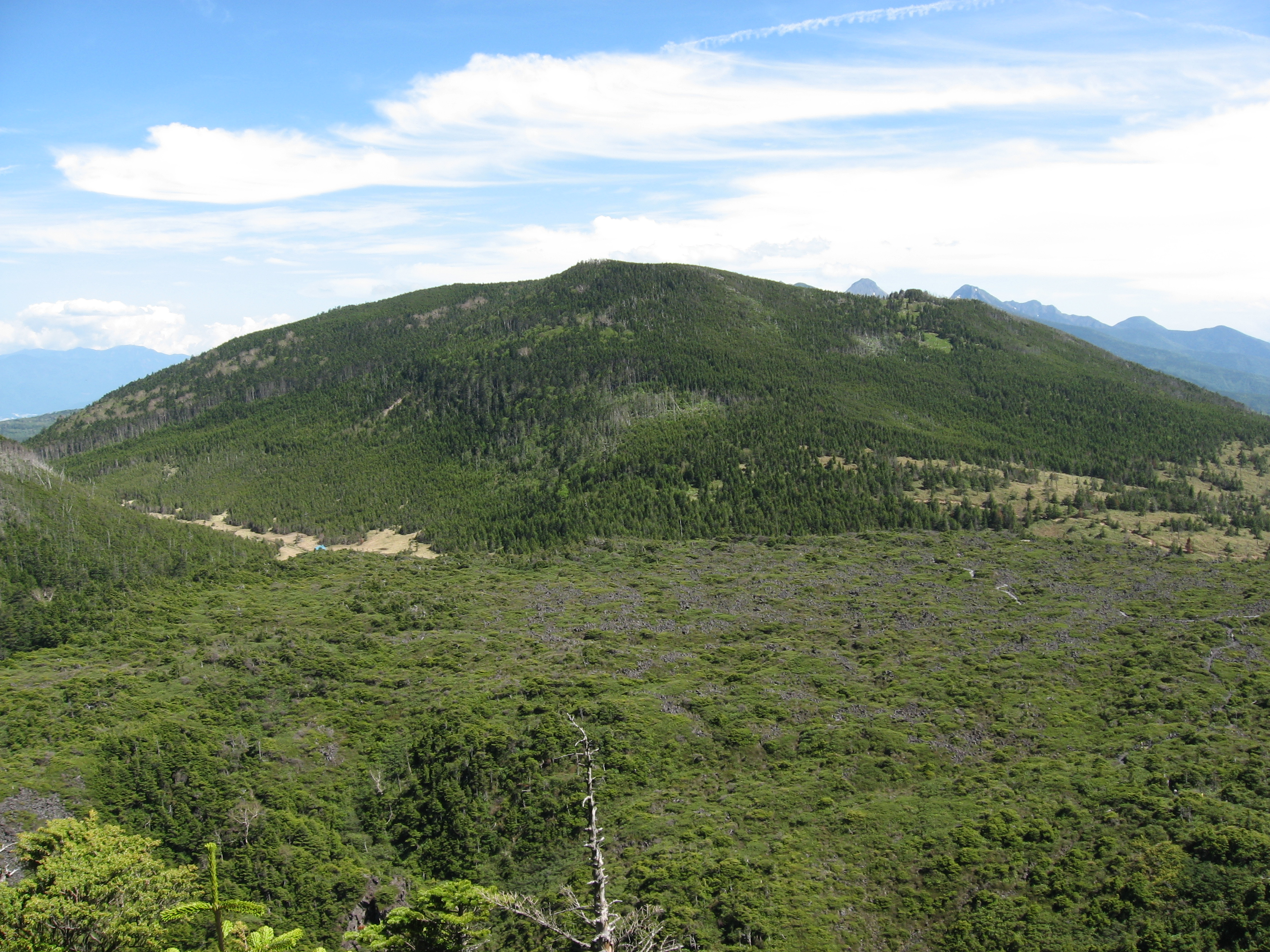 北横岳中腹より望む縞枯山